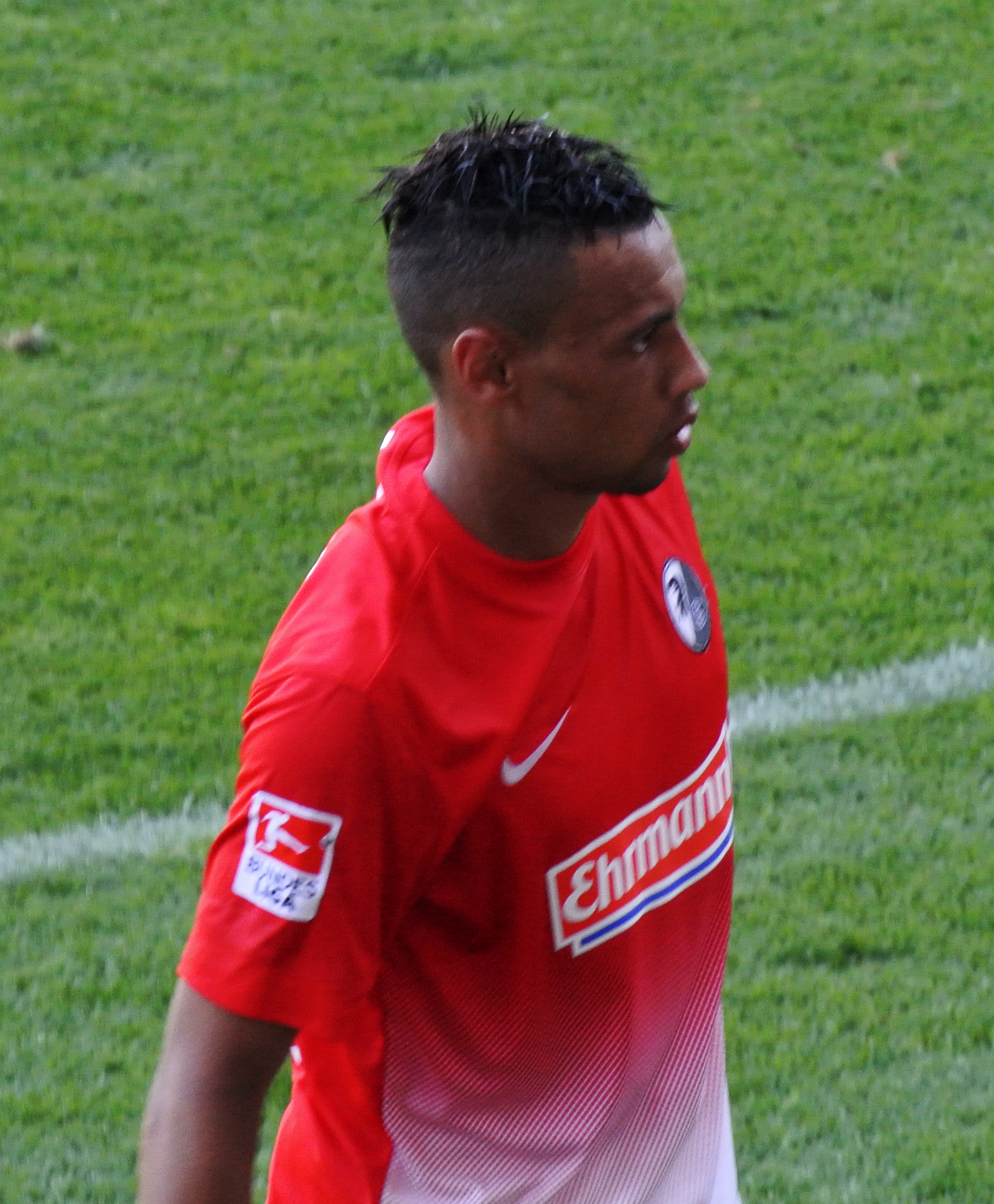 Francis Coquelin nach dem Saisonseröffnungsspiel des SC Freiburg gegen Athletico Bilbao am 27. Juli 2013